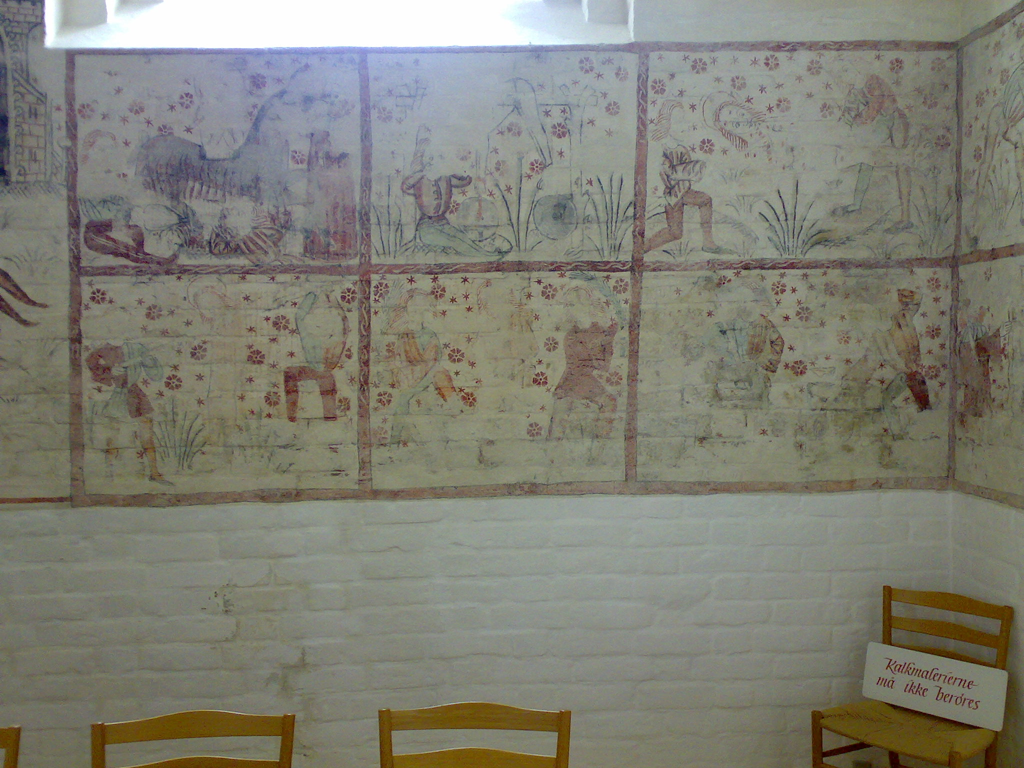 Fresco in Nibe Church, Denmark